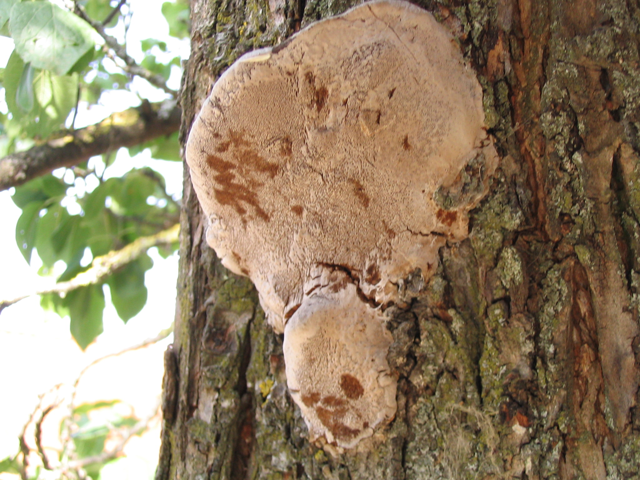 Pflaumenfeuerschwamm (Phellinus tuberculosus)